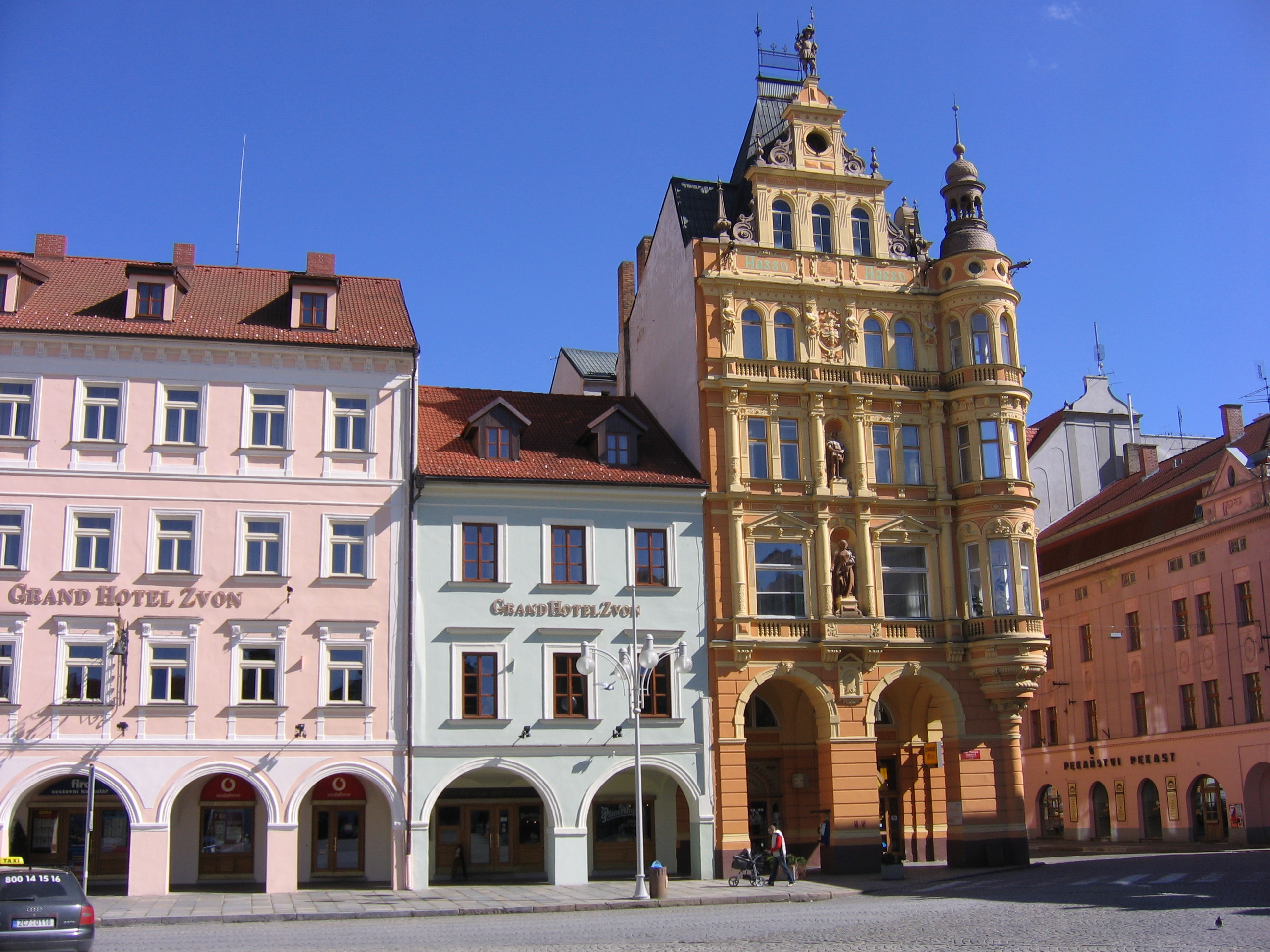 Hotel Zvon on Namesti Premysla Otakara II, Ceske Budejovce, Czech Republic